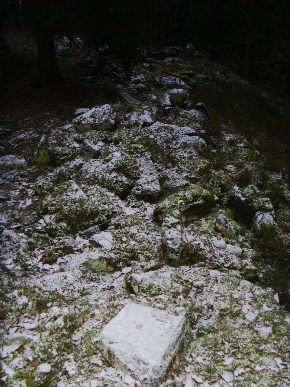 Fornborg med titeln "RAÄ Göteborg 94:2" i FMIS, belägen i stadsdelen Kortedala, Göteborgs kommun, Västergötland, Västra Götalands län, Sverige.